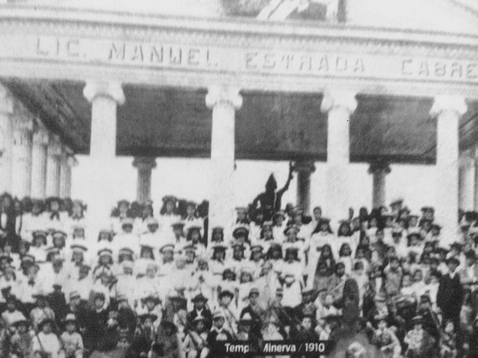 Templo de Minerva de Huehuetenango en 1910.